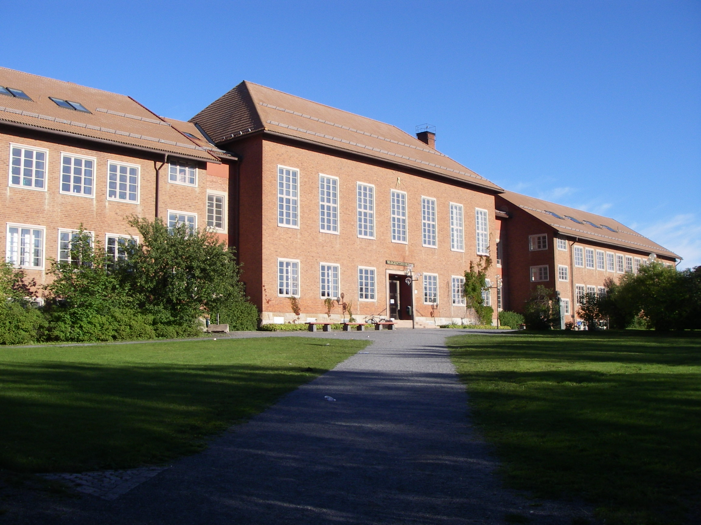 Wargentinsskolan, Östersund, Jämtland, Sweden.